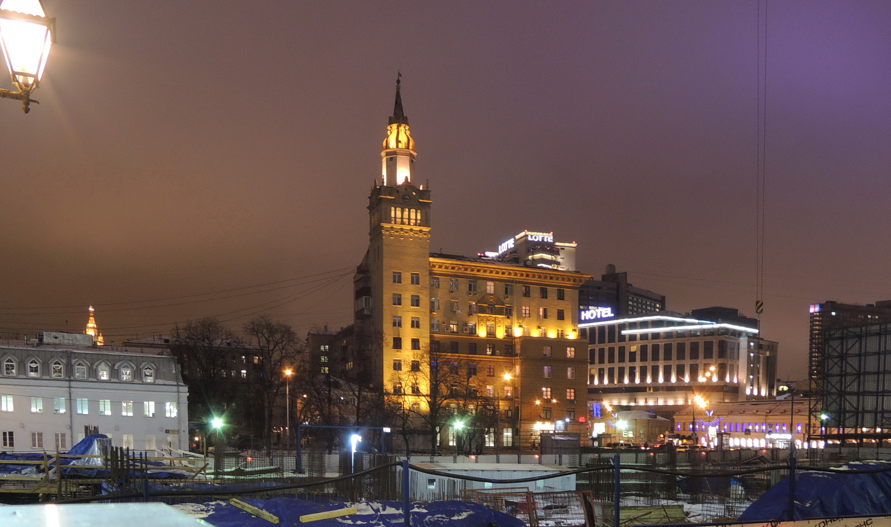 Дом работника НКВД (Москва). Несуществующий ныне вид сквозь возводимый фундамент Смоленского пассажа-2 с бокового крыльца Смоленского пассажа-1